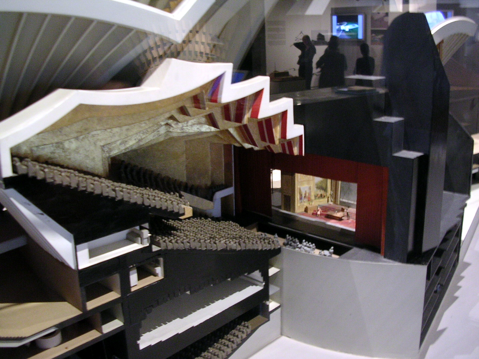 Maqueta del edificio de la Ópera de Sydney